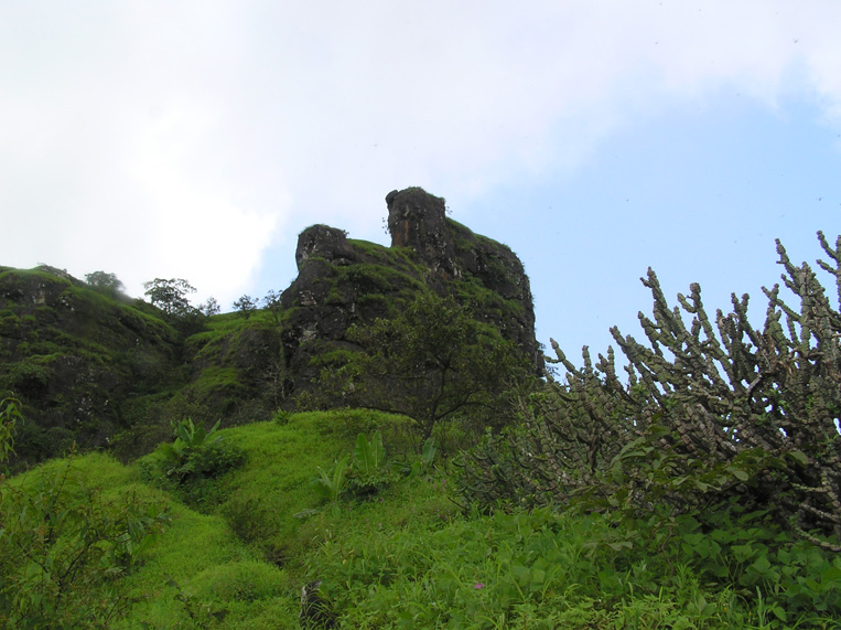 Mahuli fort, Maharashtra, India